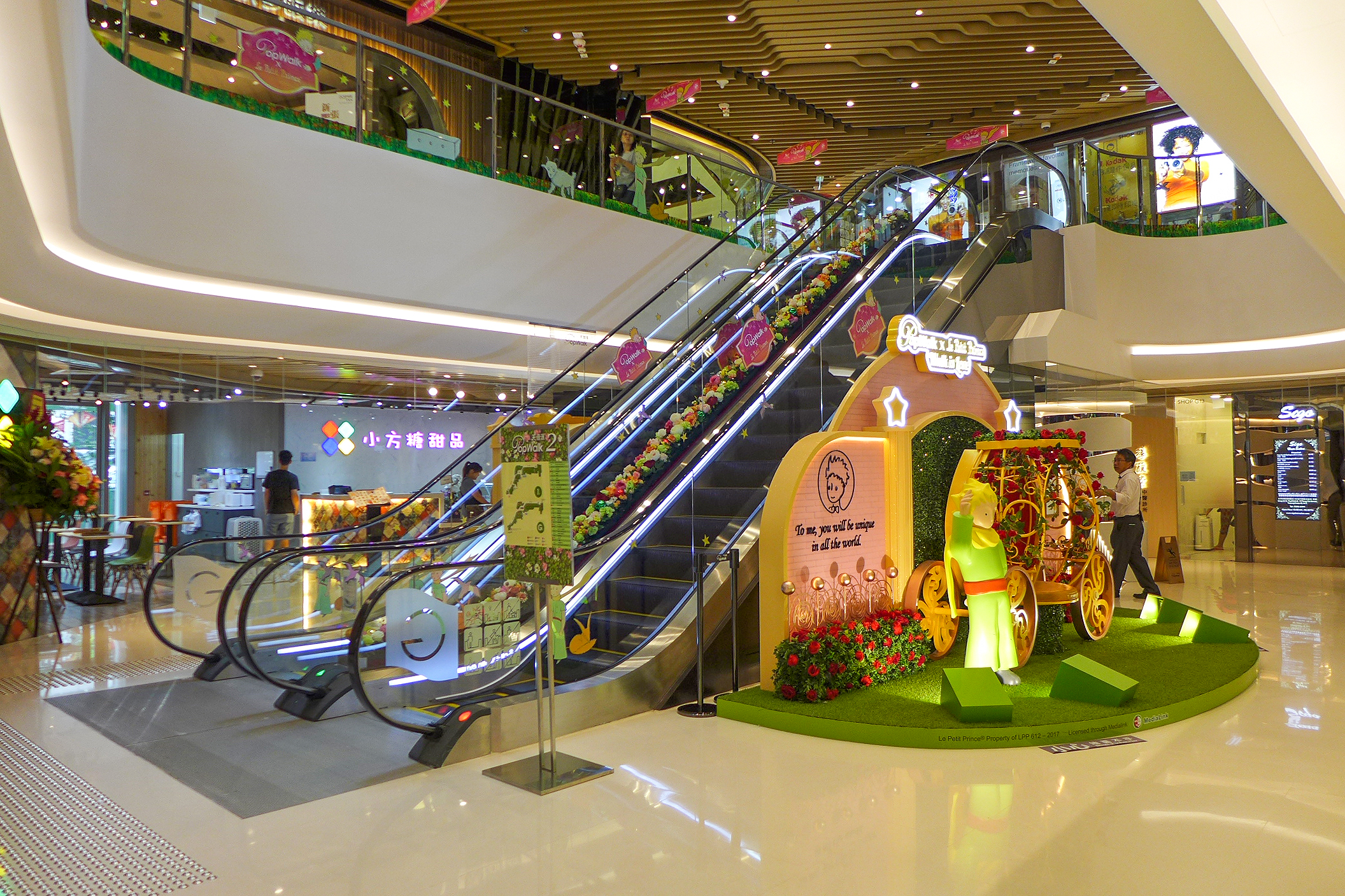 Popwalk 2 Void